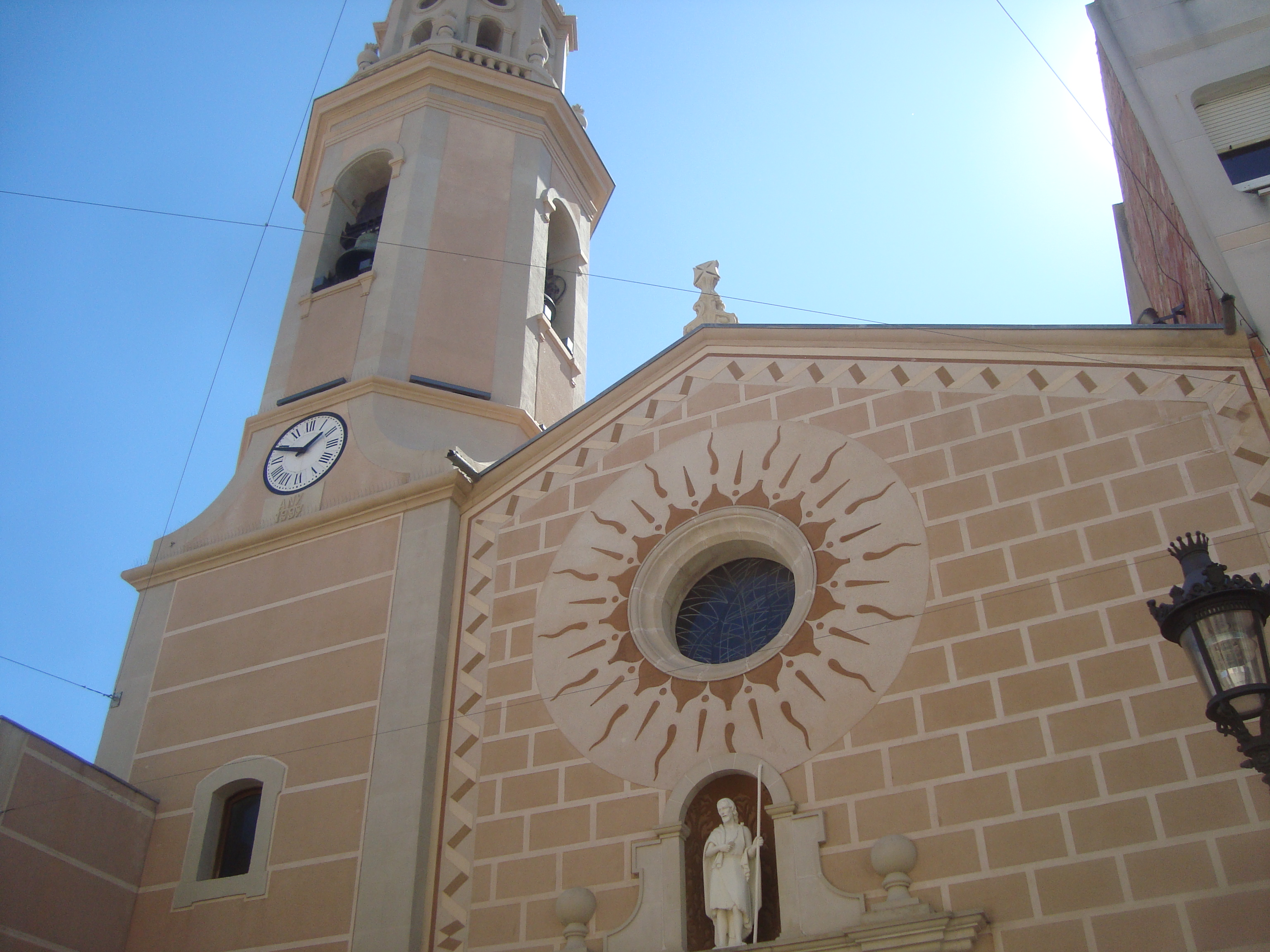 Església parroquial de Sant Joan Baptista (la Pobla de Mafumet)